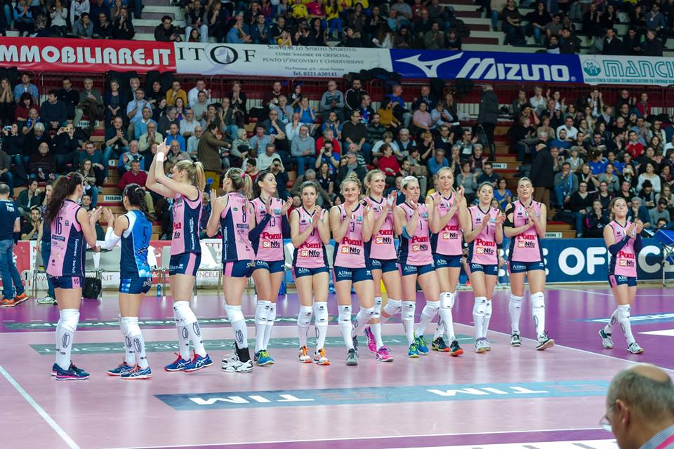 Stagione 2015-16